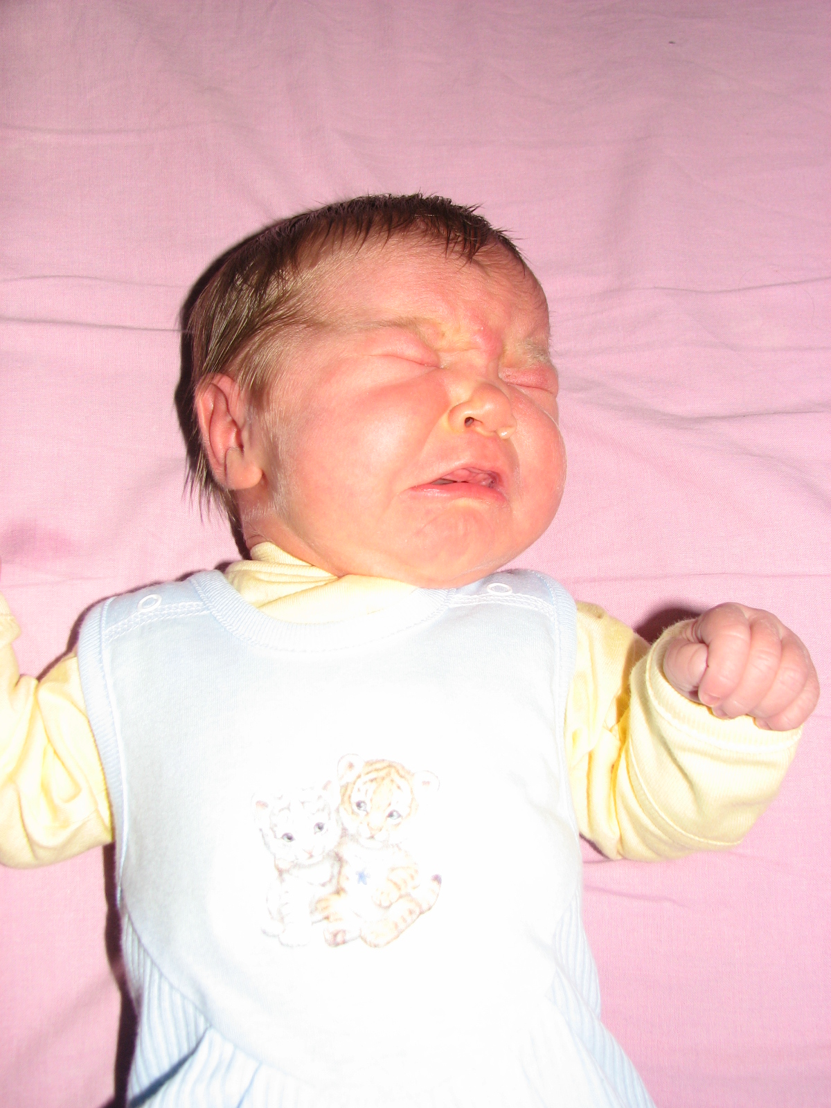 Näljane imik